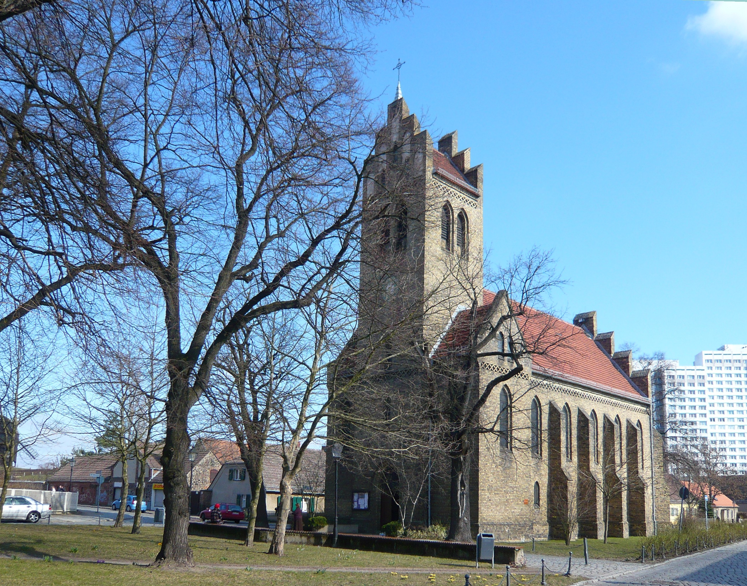 Ortsteil Marzahn, ev. Dorfkirche